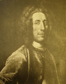 Baron Hugo Johan Hamilton (* 1668 in Göteborg; † 9. Januar 1748 in Tuna bei Linköping, Schweden), königlich schwedischer Feldmarschall